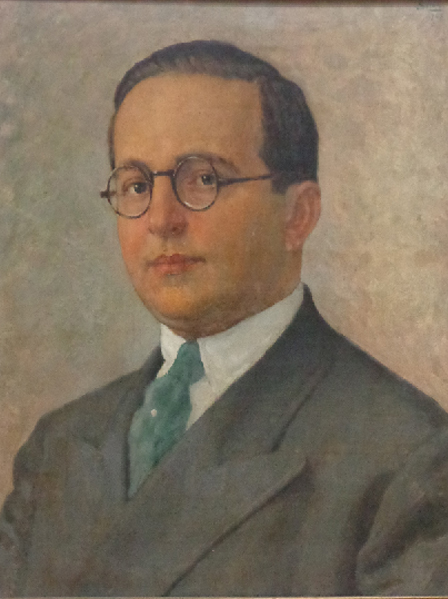 Juracy Montenegro Magalhães, governador da Bahia, de 1931 a 1937, em retrato a óleo de autoria desconhecida exposto no Memorial dos Governadores, da Fundação Pedro Calmon – Centro de Memória e Arquivo Público da Bahia, da Secretaria de Cultura do Estado da Bahia.